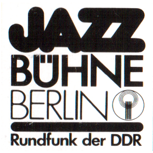 Logo des vom Rundfunk der DDR in der Zeit von 1977 bis 1989 jährlich veranstalteten internationales Festival des zeitgenössischen Jazz